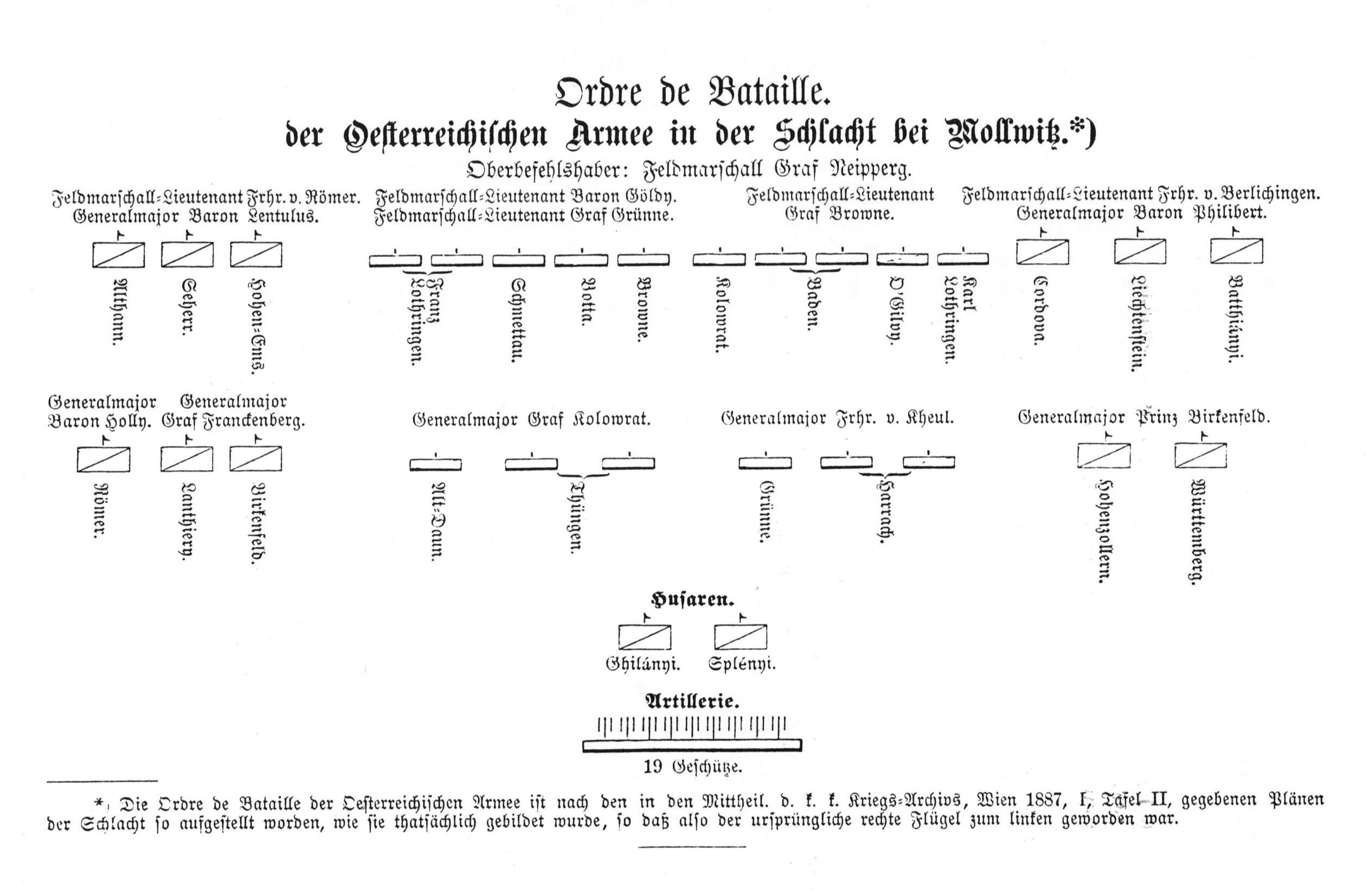 Schlacht bei Mollwitz, Ordre de Bataille, Österreich